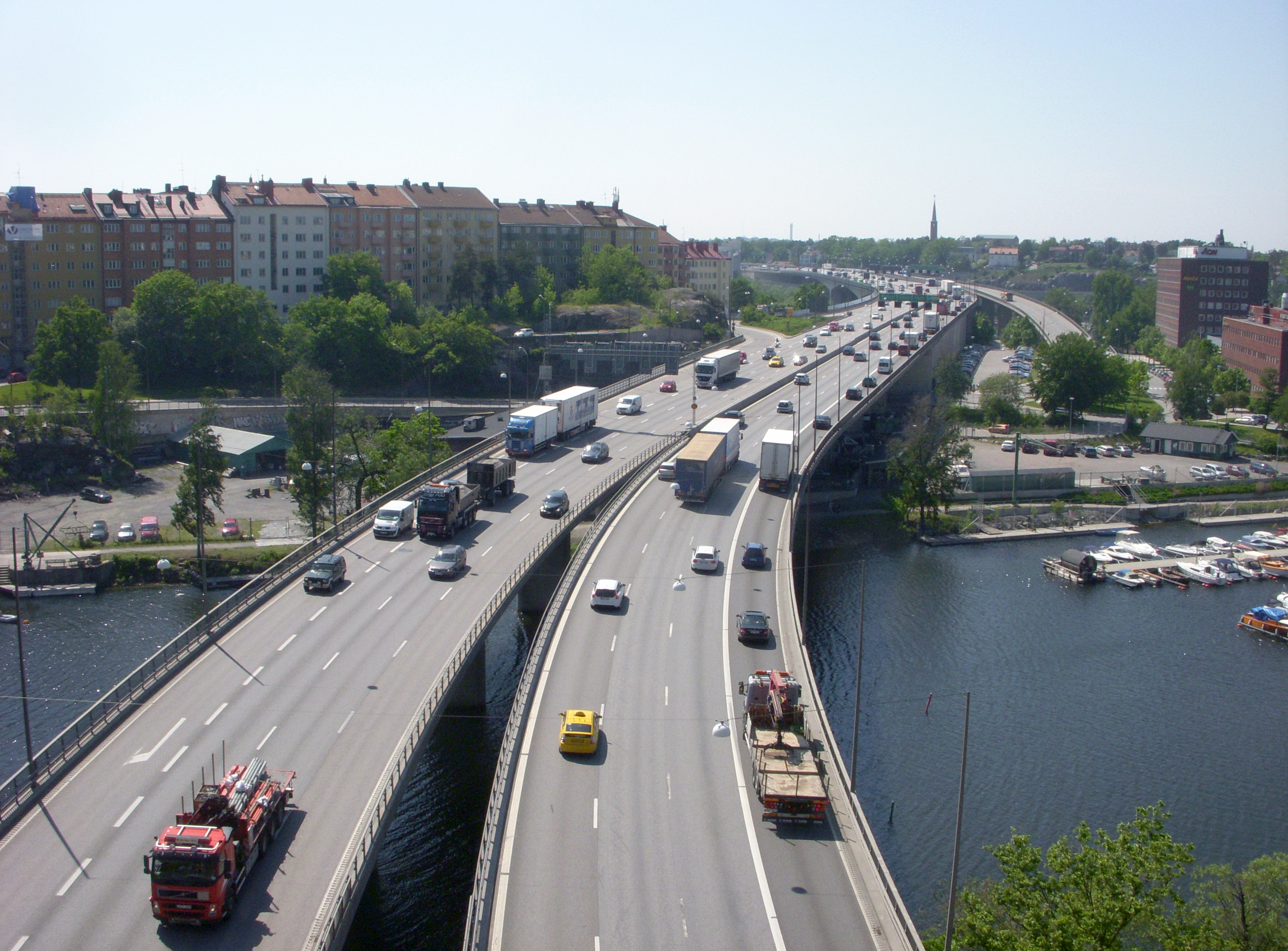 Essingeleden från Fredhäll, vy mot syd med Fredhällsbron